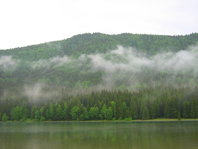 Felhők a Szent Anna-tó felett, Hargita